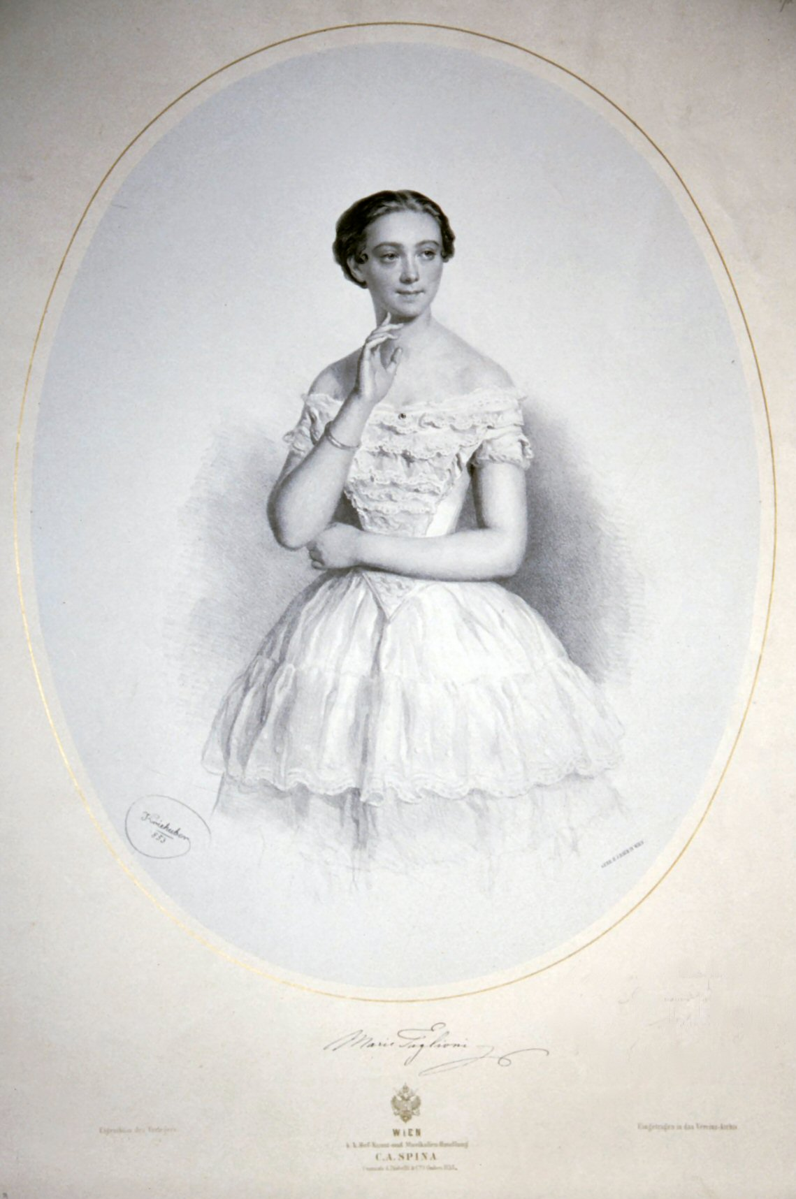 Maria Taglioni die Jüngere (1833-1891), italienische Tänzerin, Nichte der berühmten Maria Taglioni, Seit 1866 mit Josef Fürst von Windisch-Grätz verheiratet. Lithographie von Josef Kriehuber, 1853